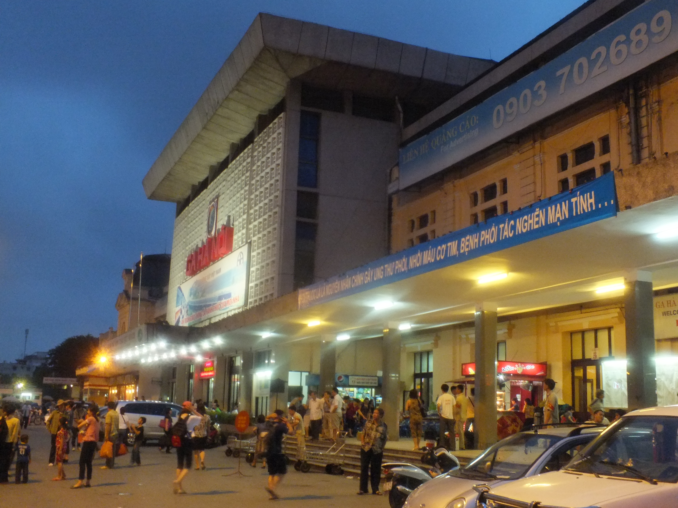 2013-07-15 Ga Ha Noi(Hanoi Station)ハノイ駅